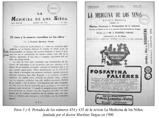 Portada La Revista de los Niños